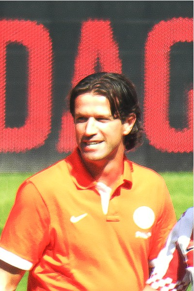 Ernest Faber als assistent-trainer van PSV, 1 augustus 2012.